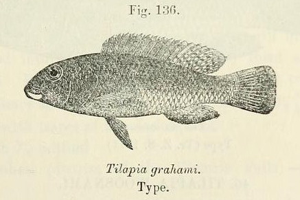 Alcolapia grahami